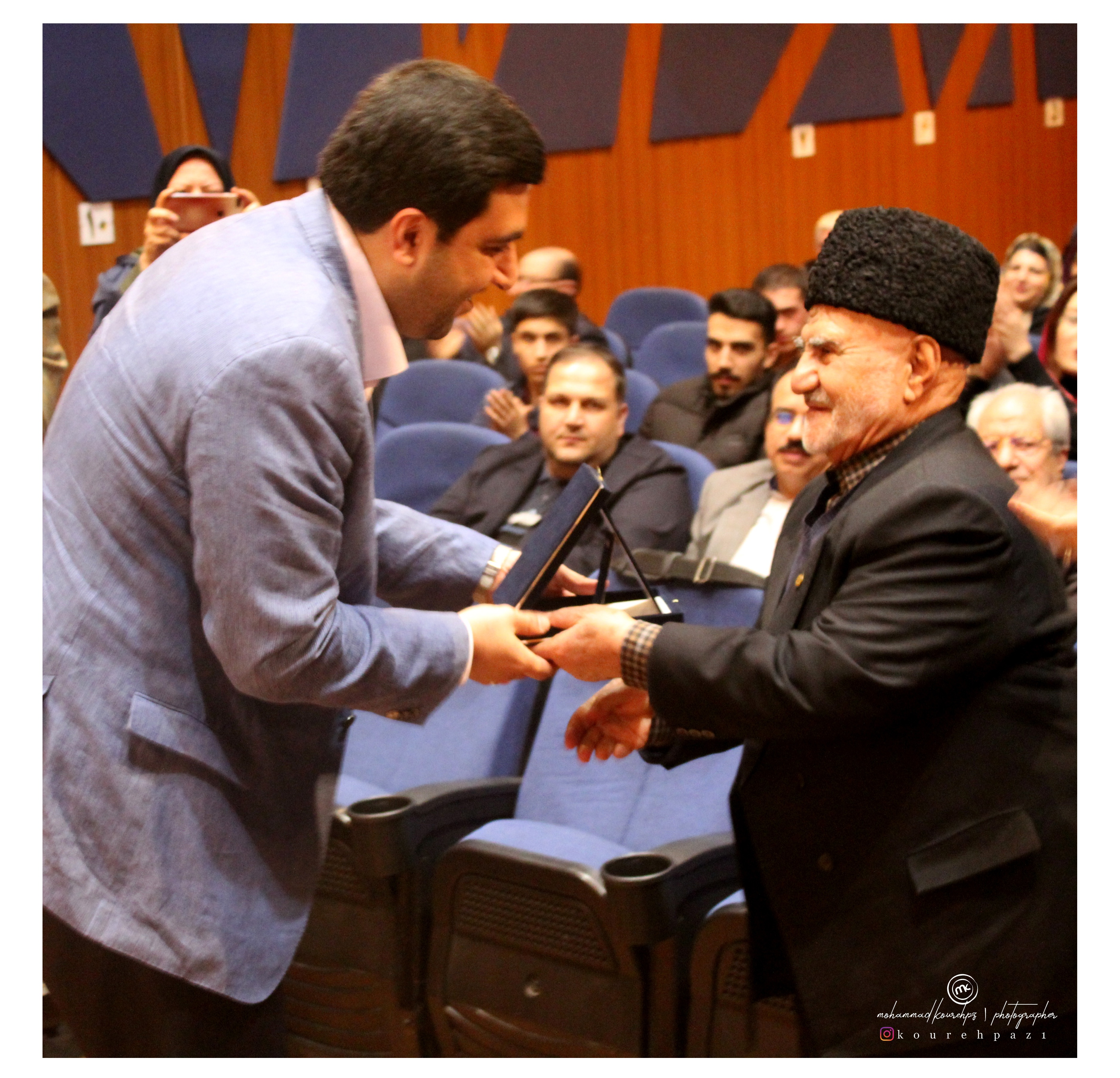 اهدا تندیس یادبود از جشن طنز زنجبیل به استاد کریمی مراغه ای